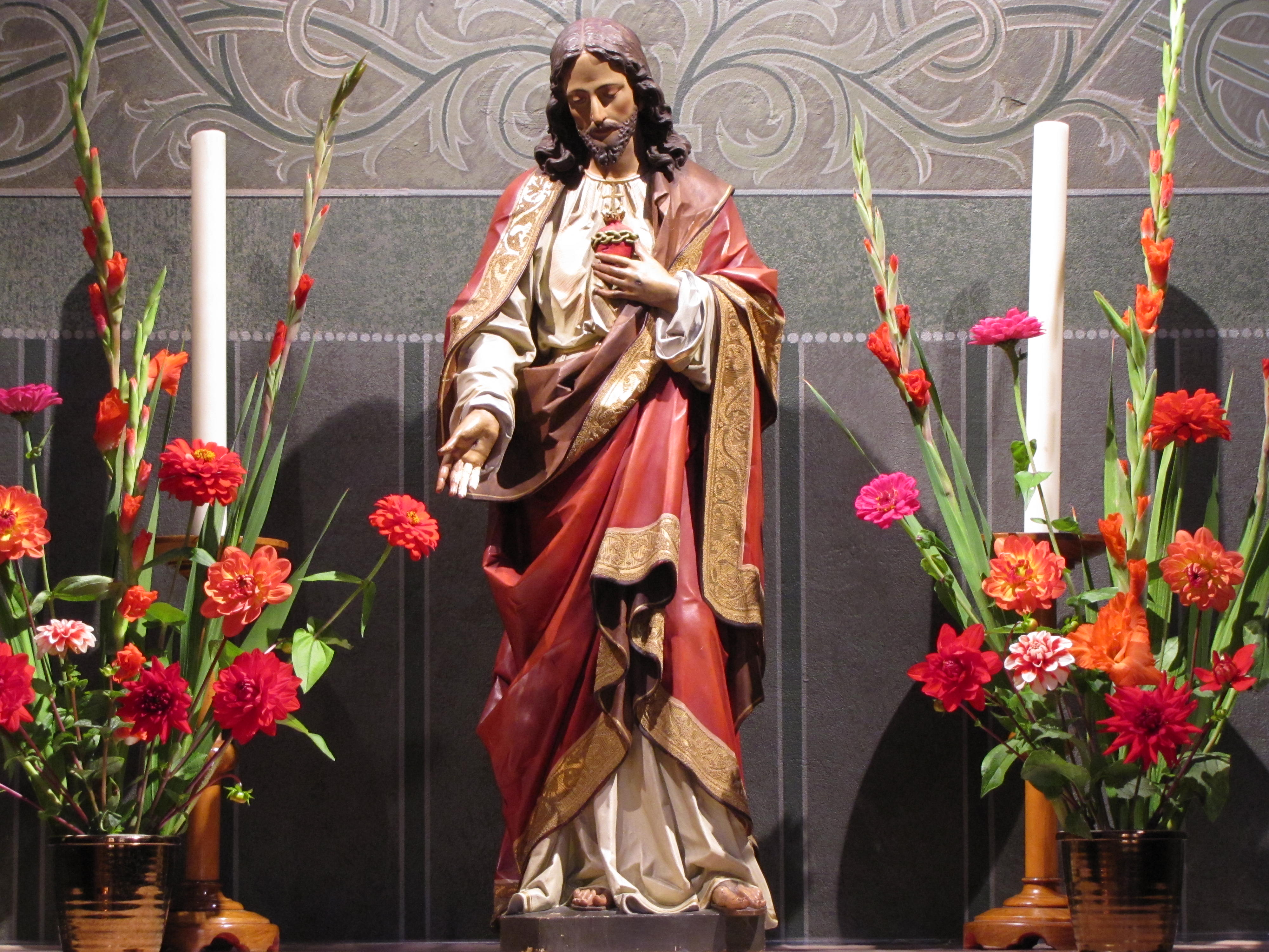 Alsace, Bas-Rhin, Chapelle du Prieuré des Carmélites du Sacré-Cœur de Marienthal (IA00062023).Statue "Sacré-Cœur de Jésus" (XIXe).